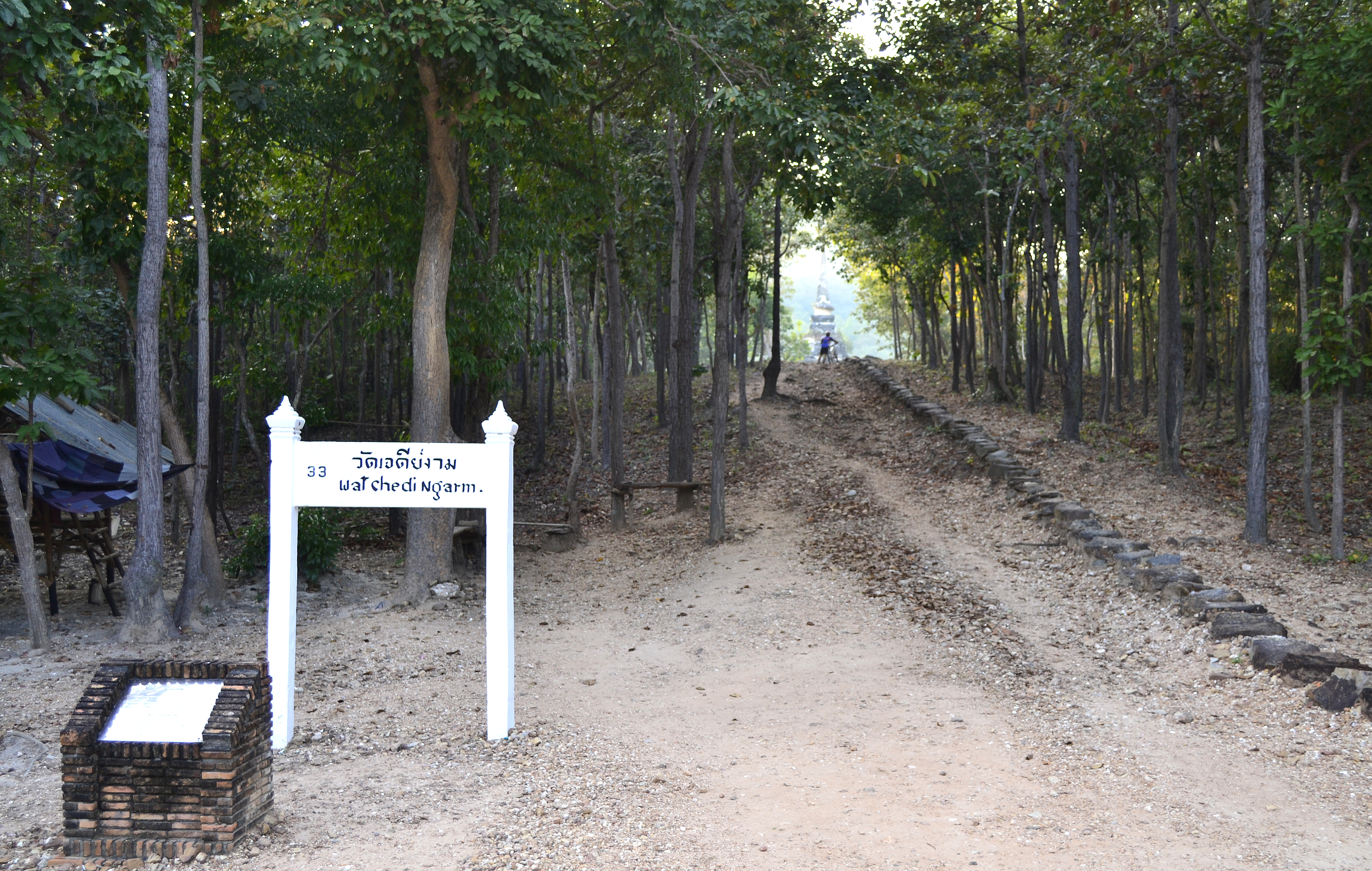 Wat Chedi Ngam im Geschichtspark Sukhothai